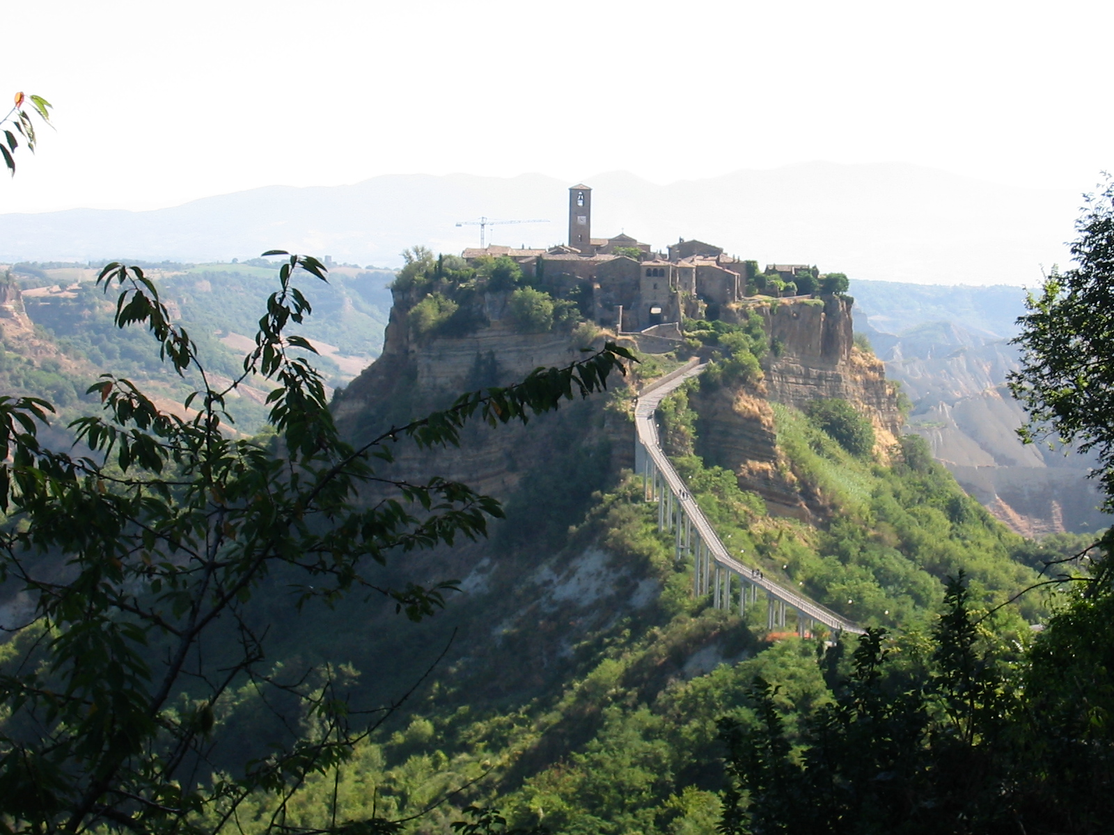 Civita di Bagnoregio, Laziocivita di bagnoregio